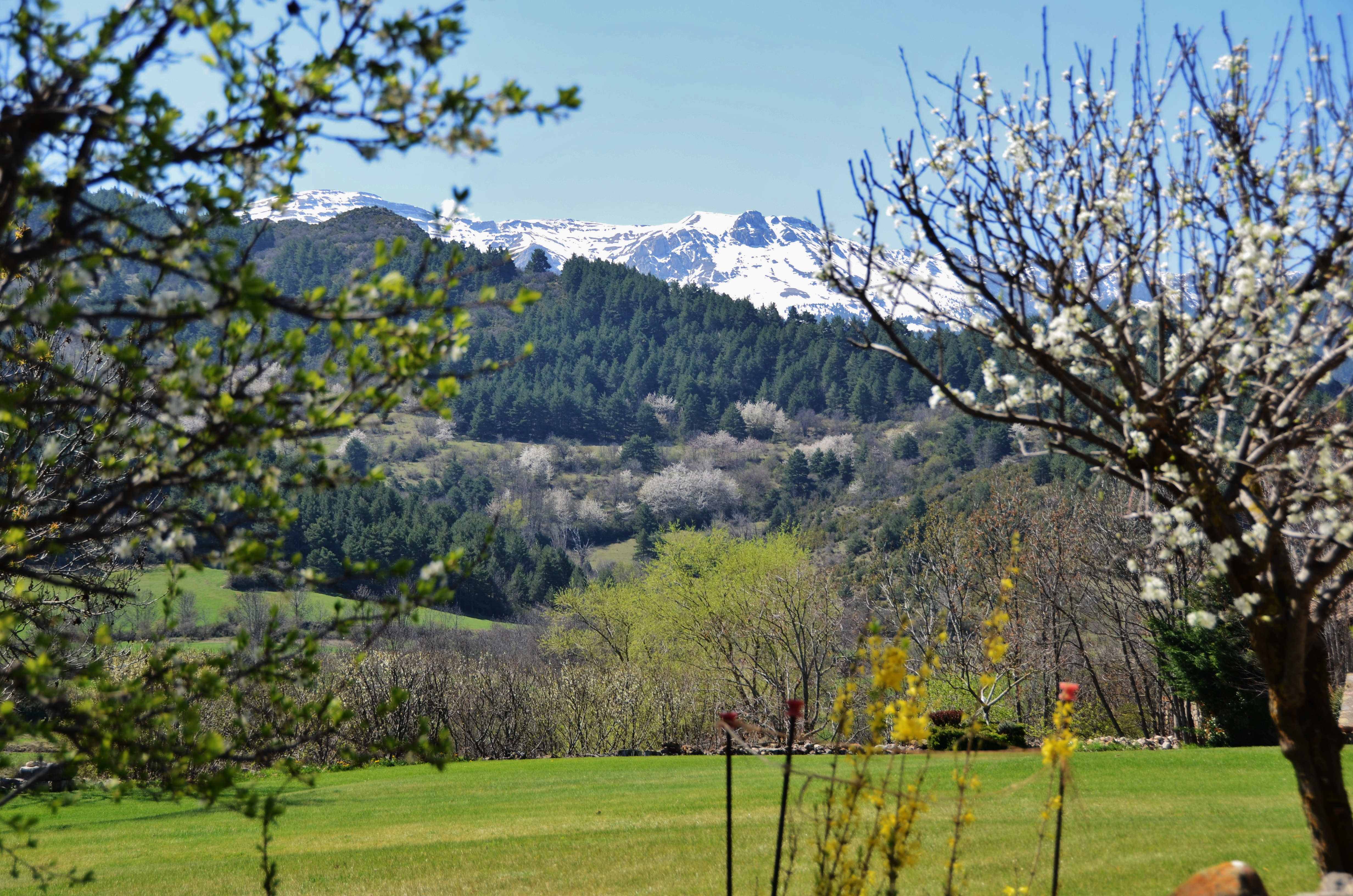 Serra del CadÃ­ This is a a photo of a geologic site or geotope in Catalonia, Spain, with id: IEIGC-144